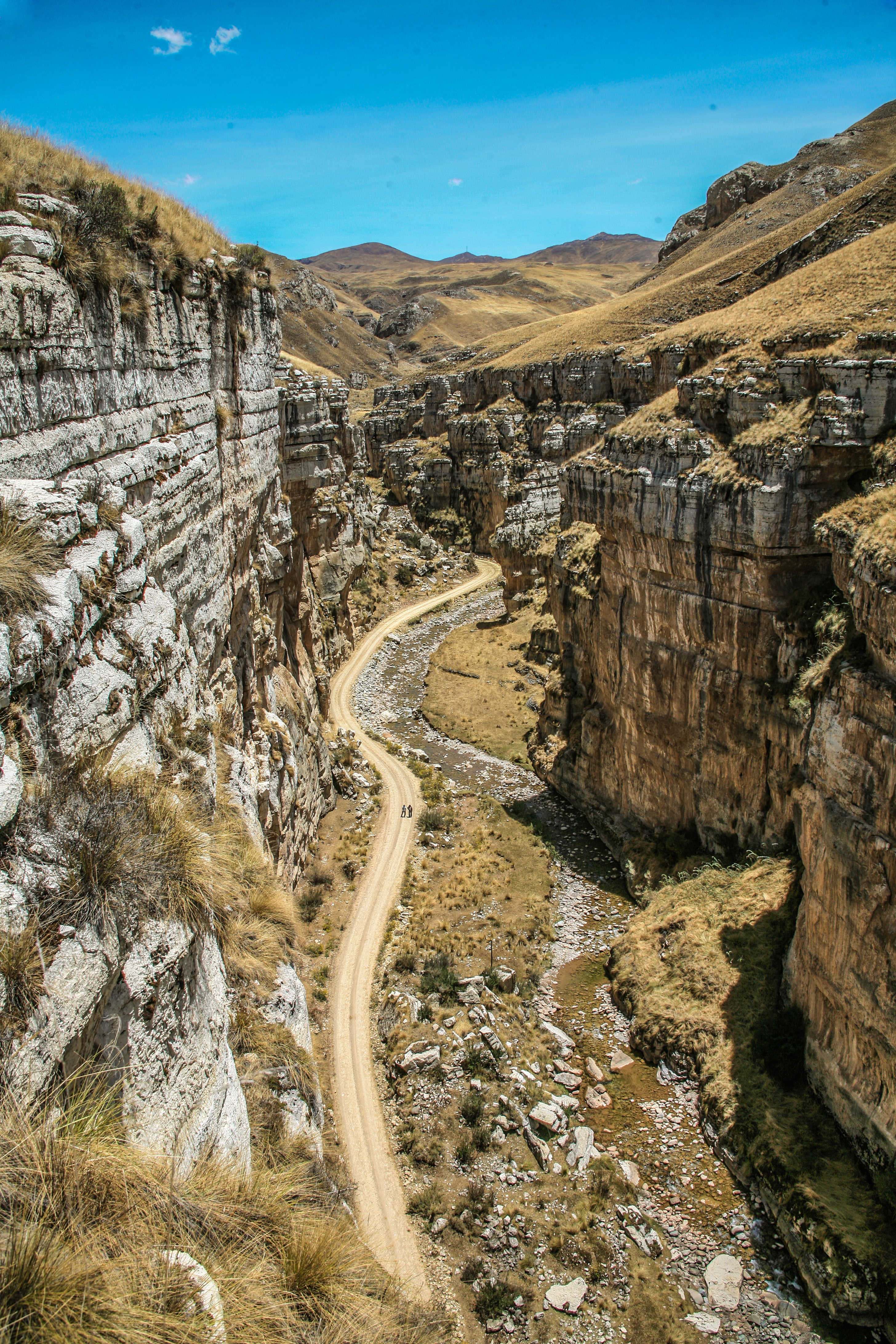 El cañon del Shujto se encuentra en el distrito de Canchayllo de la provincia de Jauja, forma parte de la Reserva Nor Yauyos Cochas.